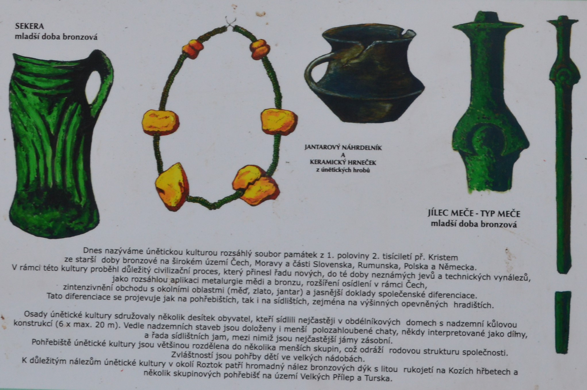 Únětická kultura a zdejší archeologické nálezy (informační tabule naučné stezky)